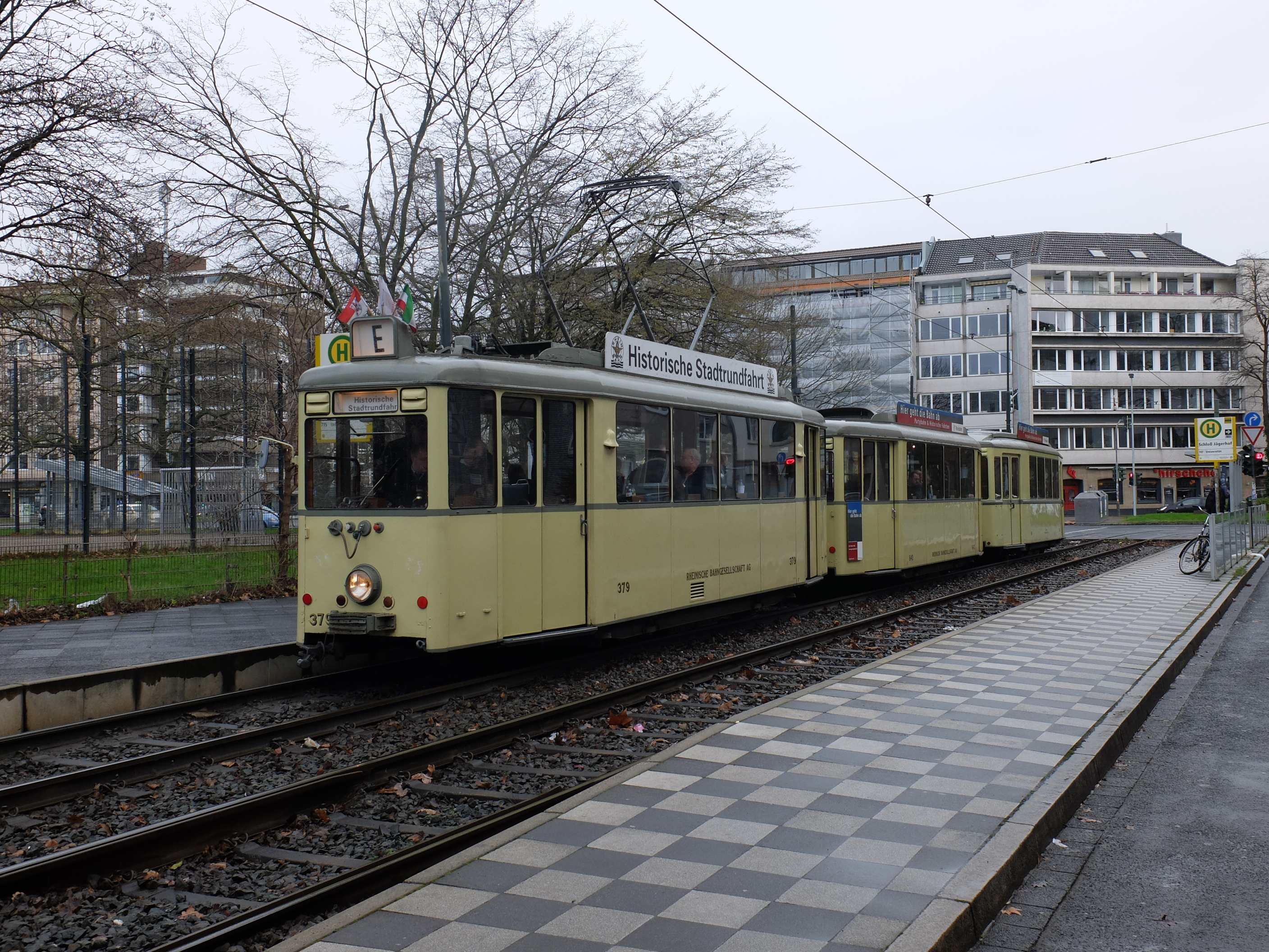 Verbandwagen Nr. 379 der Rheinbahn an der Haltestelle Schloß Jägerhof